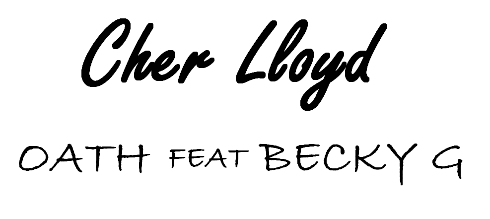 Versión editada del logo (oficial) de «Oath» de Cher Lloyd Con Becky G.